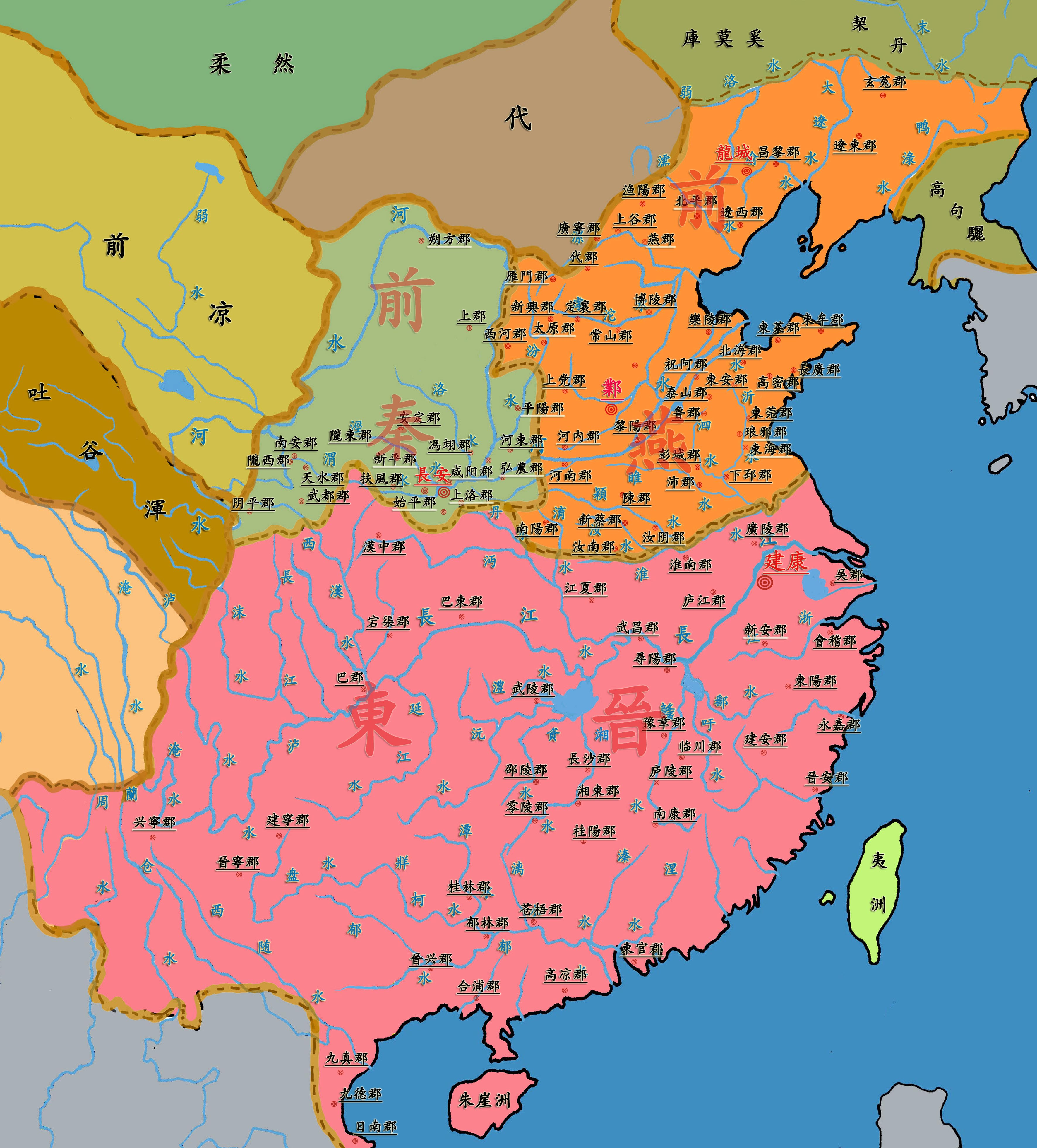 File:东晋(16 Kingdoms) 1.jpg